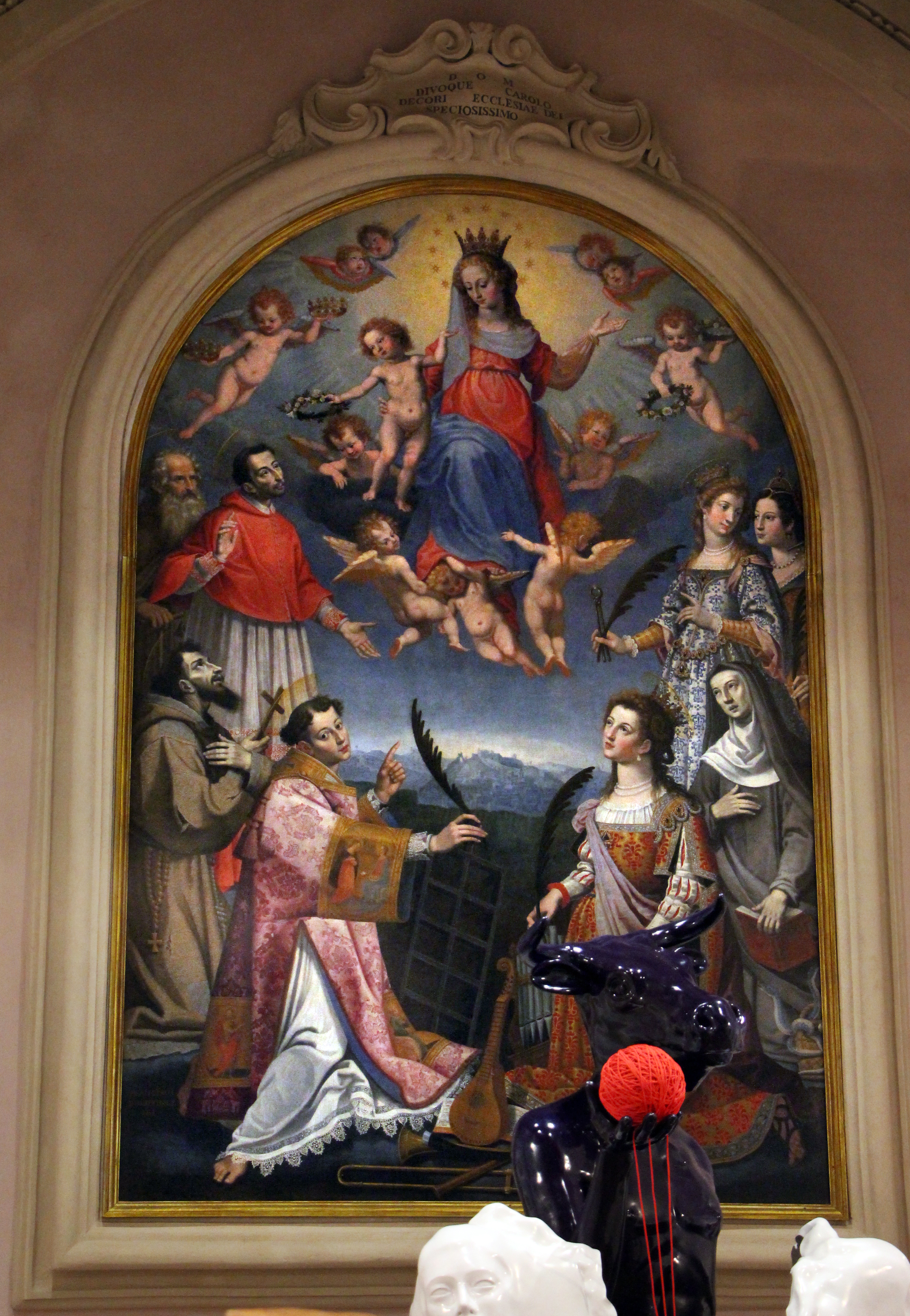 San Giacomo (Castelfiorentino)